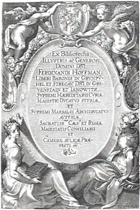 Exlibris Ferdinand Hoffmann (1540-1607)